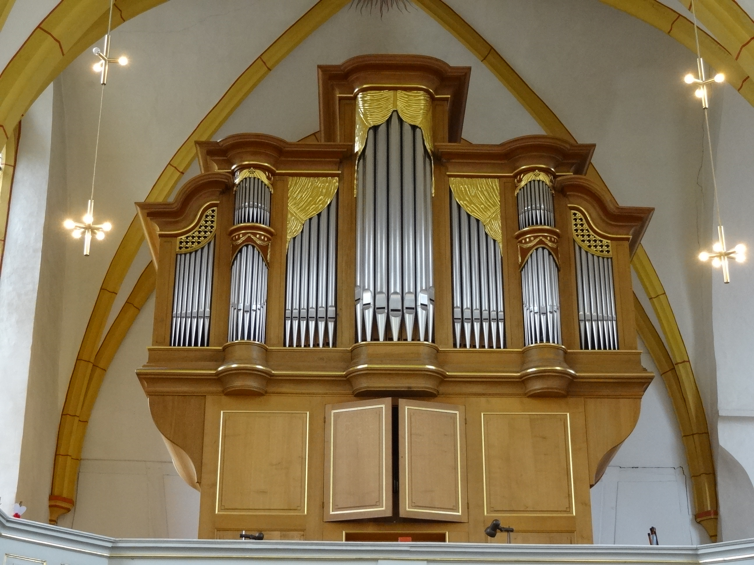 Franziskanerkirche (Wetzlar)